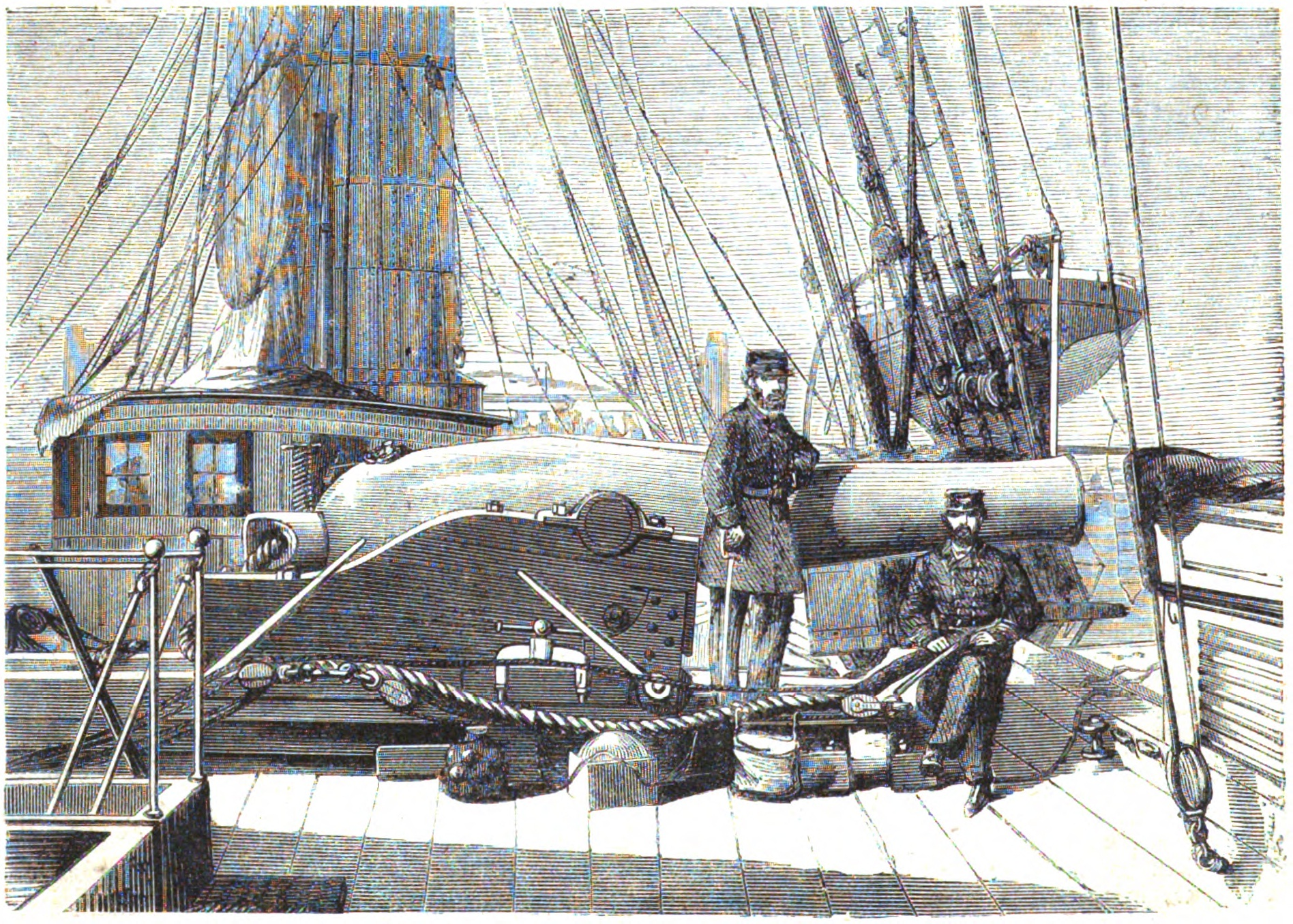 Ansicht der Drehkanone auf der USS "Kearsarge", 1865.